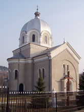 Церква у м. Бібрка. 1906 р., архітектор В. Нагірний (1848—1921)